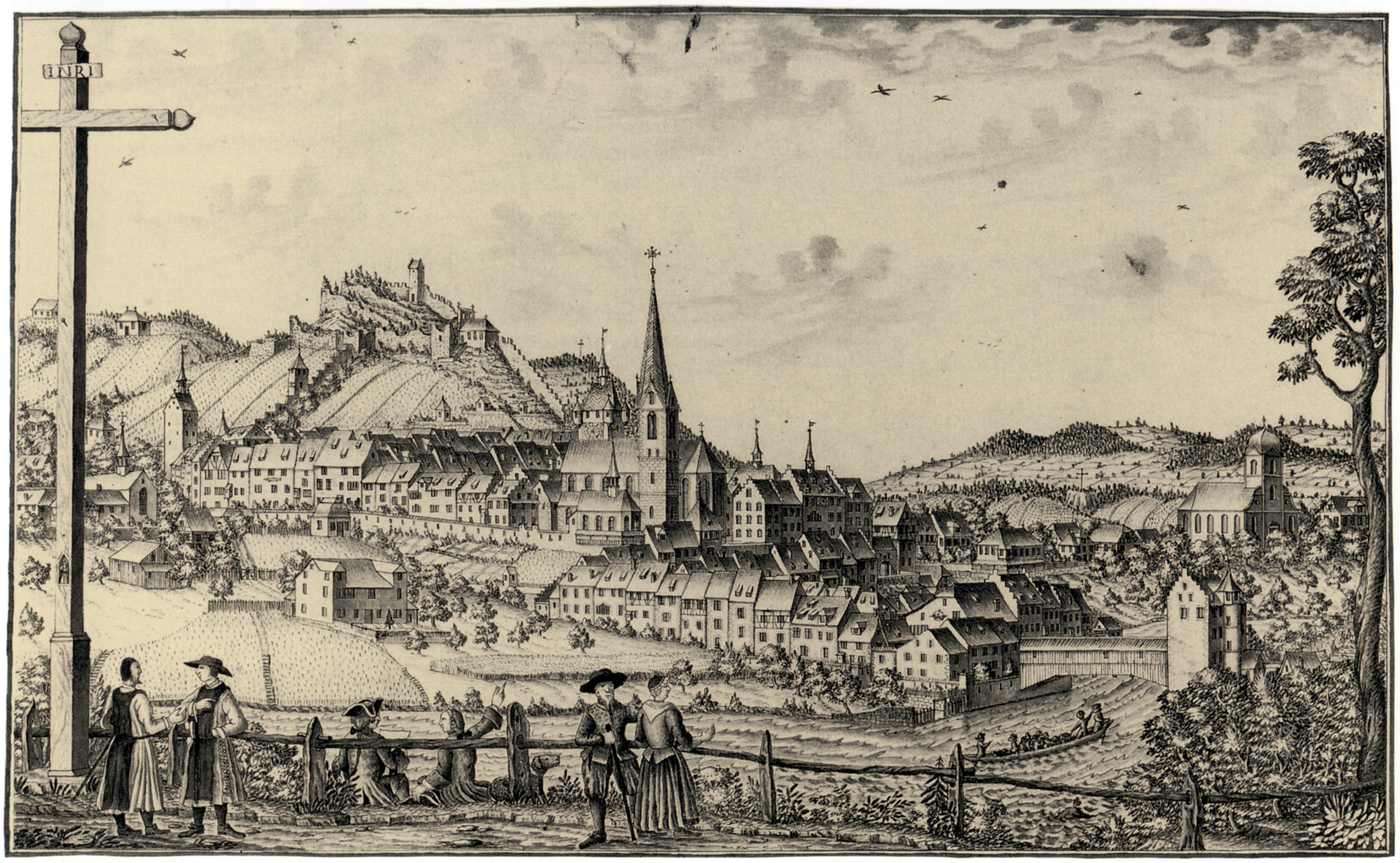 Ansicht von Baden AG von Südosten, 1751. Tuschezeichnung von Hans Conrad Nözli.